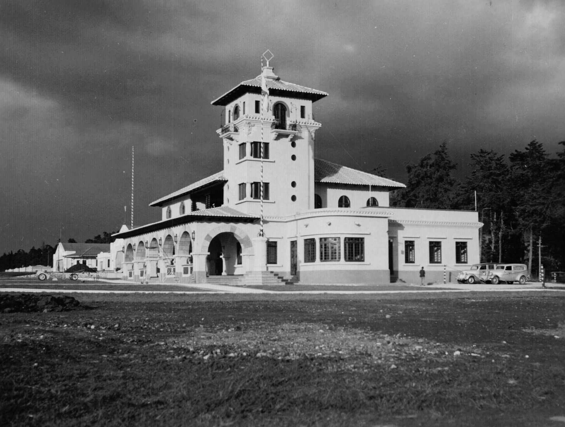 Aeropuerto Internacional La Aurora en 1940